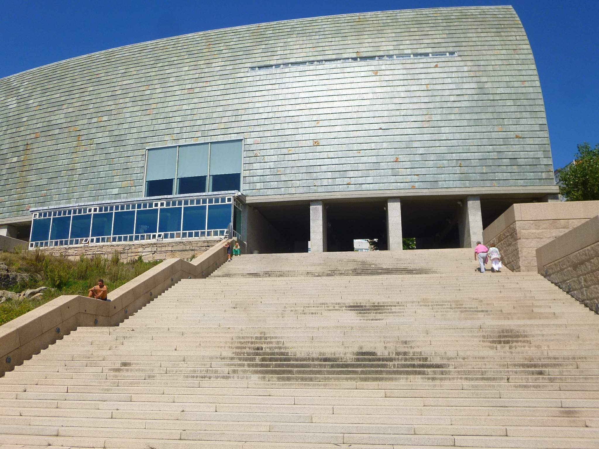 A Coruña - Domus, Casa do Home (Domus)